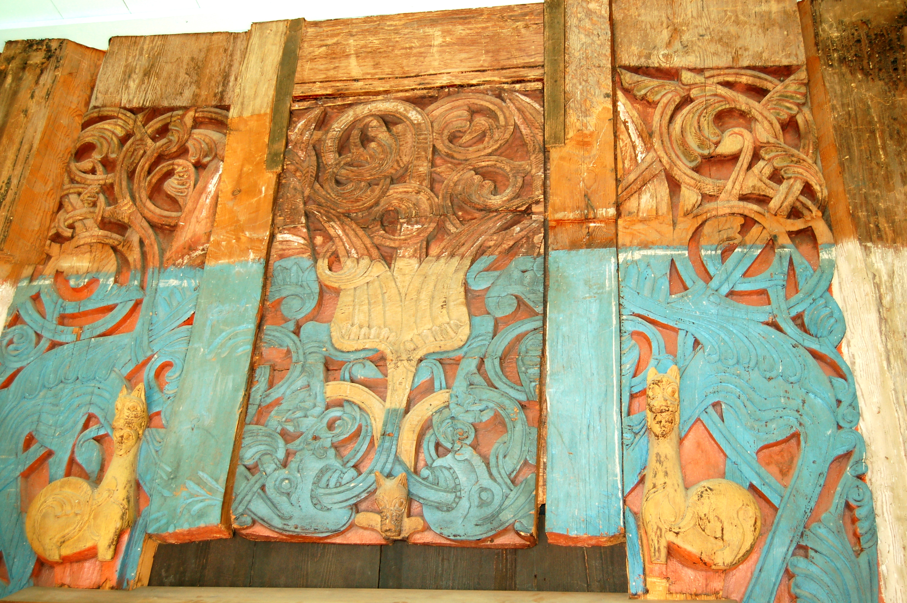 Vestportalen i Flesberg kirke